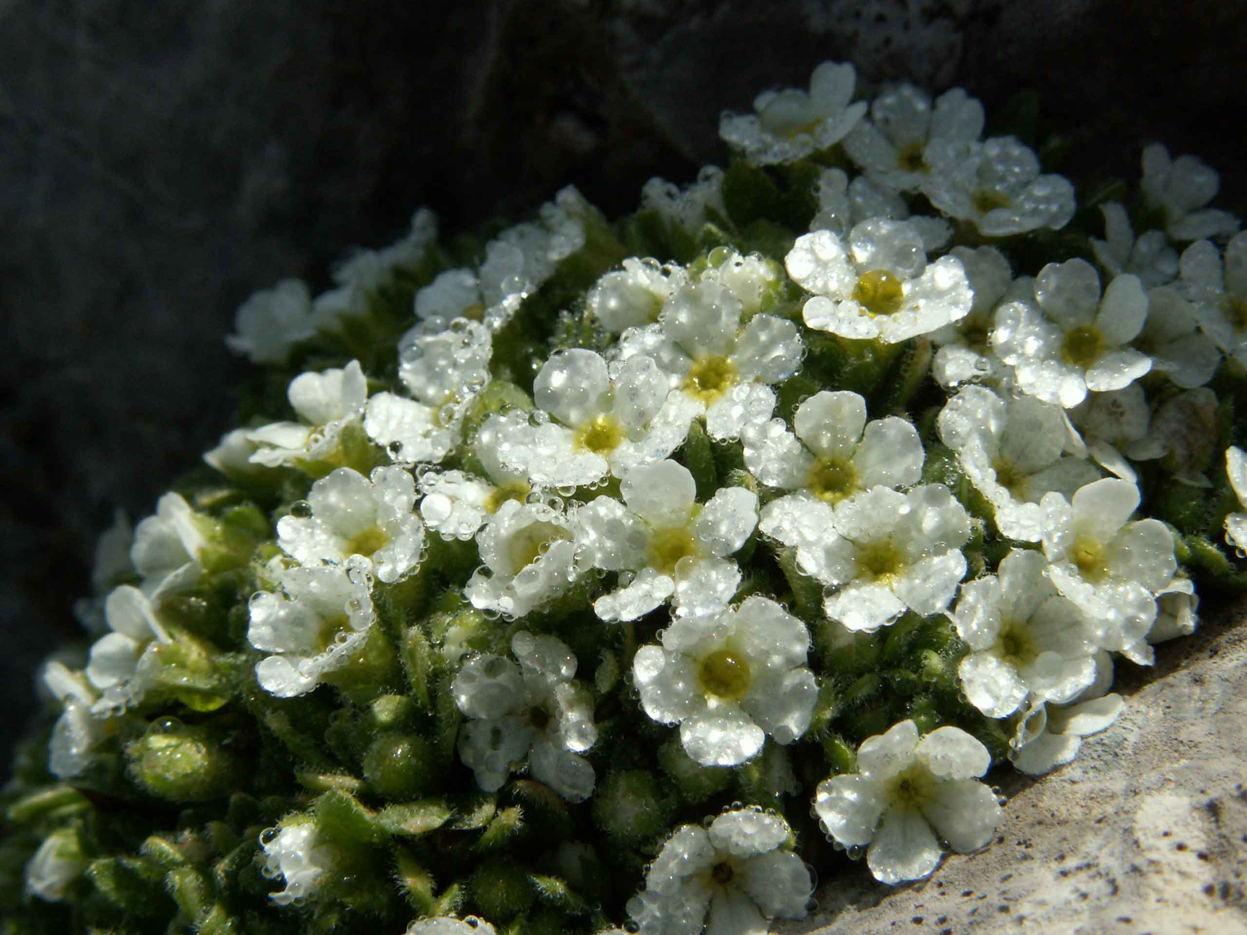 Androsace helvetica, Schynige Platte, Kanton Bern, Schweiz